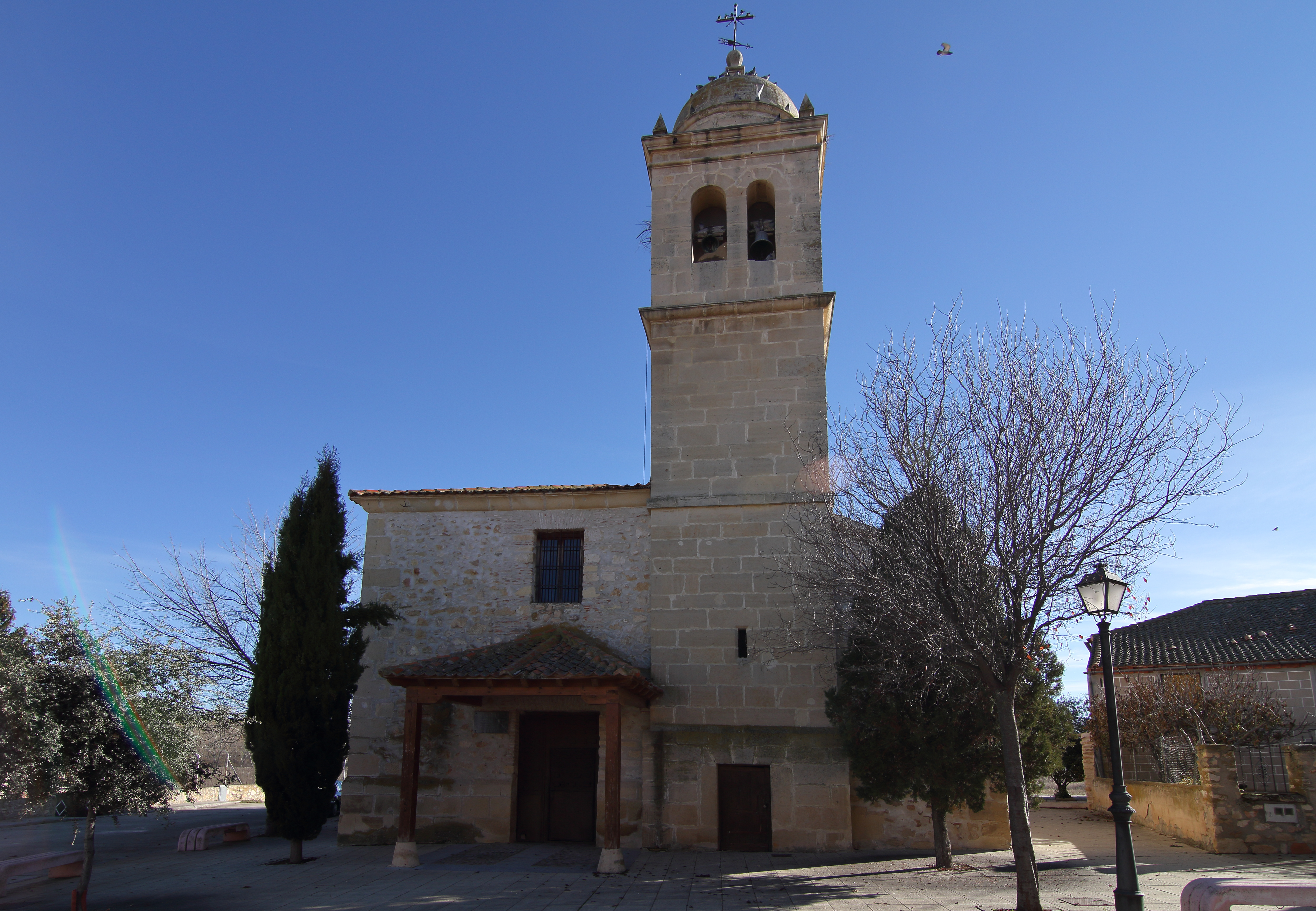 Encinillas, Iglesia de San Vicente Mártir, fachada principal